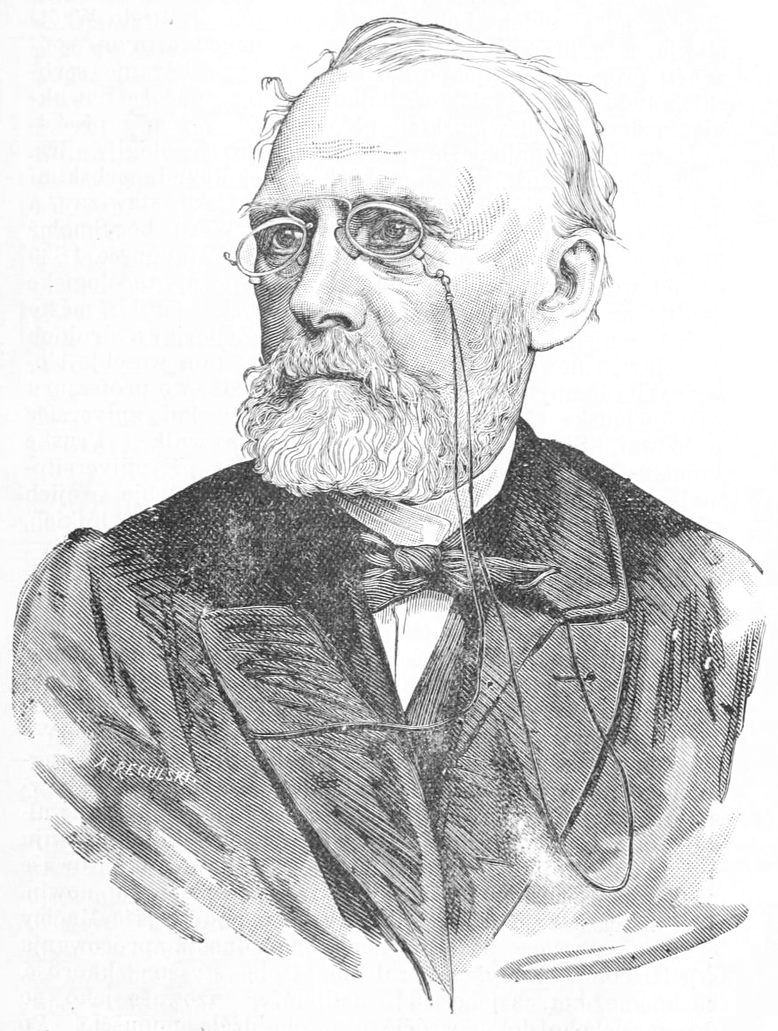 Hornjoserbsce: Portret Jana Arnošta Smolerja – serbski filolog, spisowaćel a nakładnik.